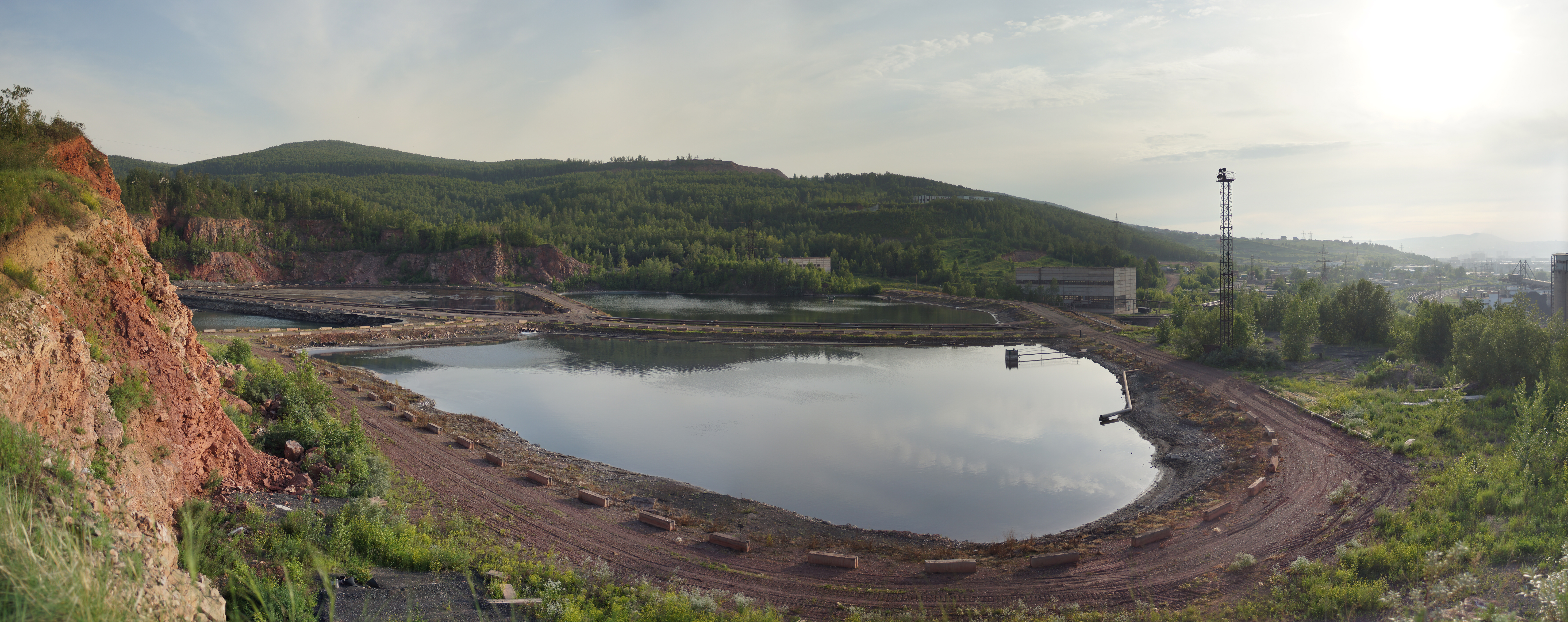 Торгашинское месторождение раннедевонской флоры: Красноярск, Красноярский край На фото представлены золоотстойники красноярской ТЭЦ-2, размещённые в карьере «Увал Промартели». От Торгашинского местонахождения раннедевонской флоры их отделяет тонкая известняковая «стенка». This image is related to the protected area of Russia number 2410128